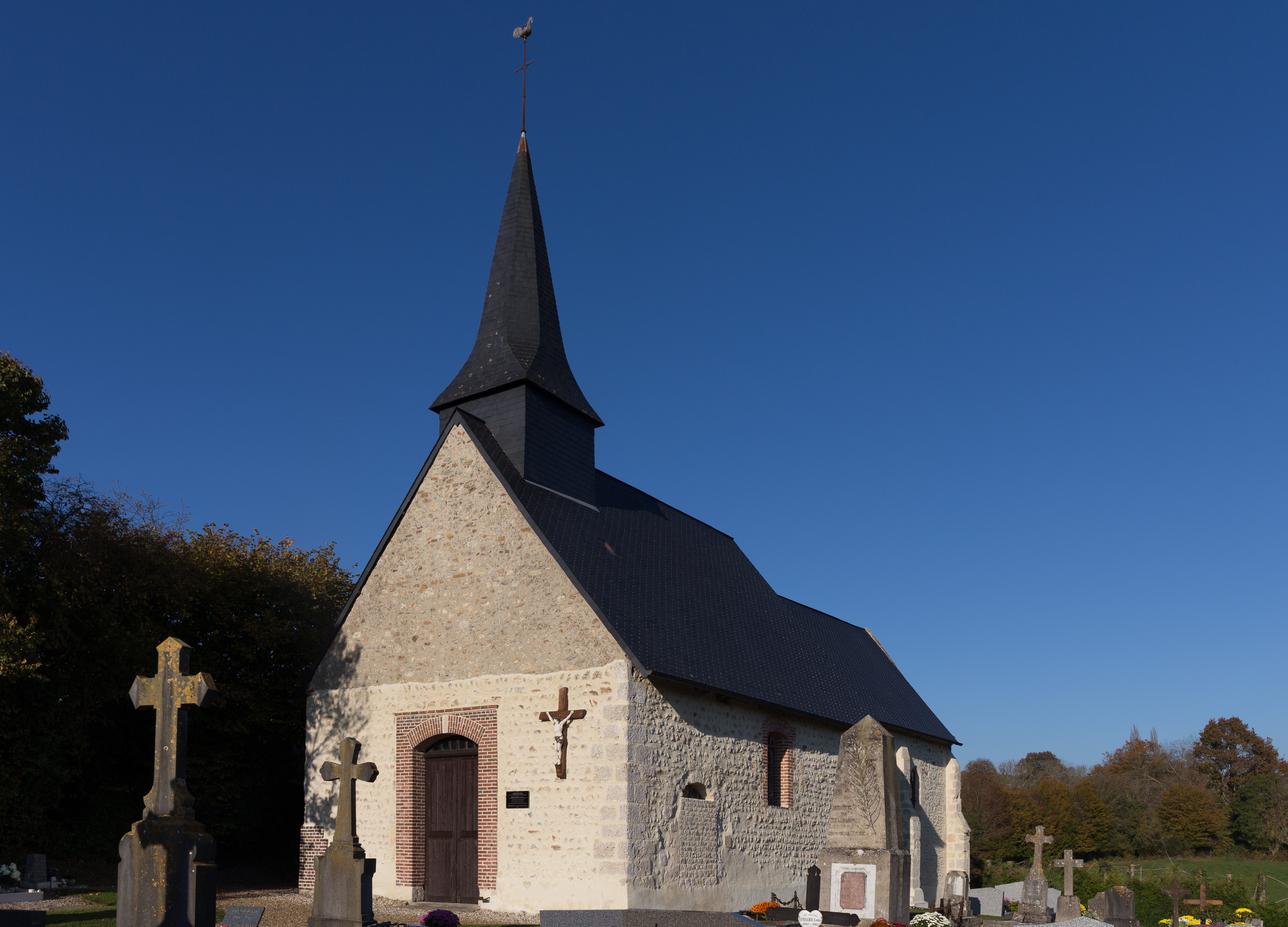 Église Saint-Taurin d'Englesqueville-en-Auge